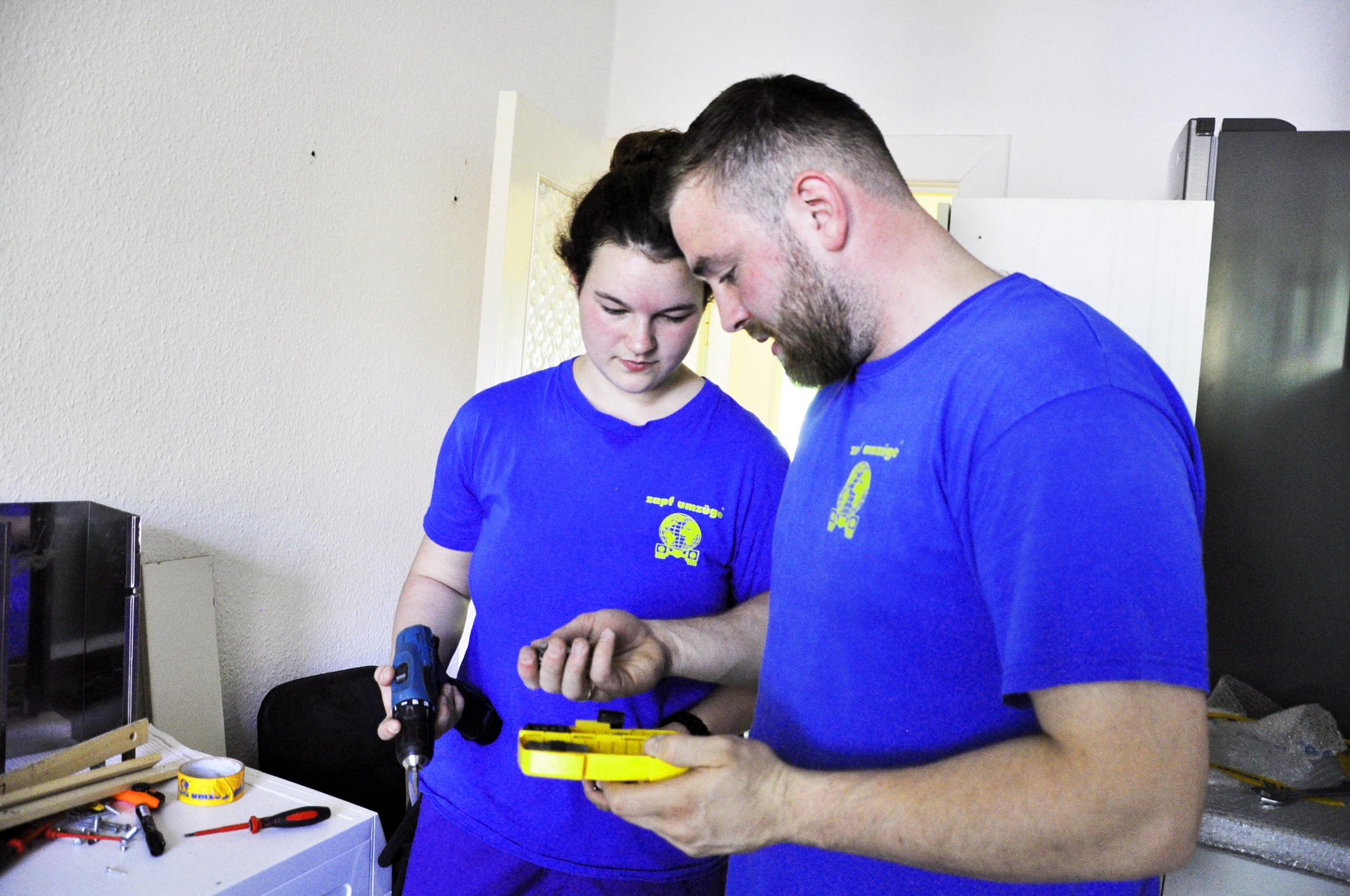 zapf umzüge AG, 1975 gegründete internationale Umzugsfachspedition mit Sitz in Berlin und Filialen in sieben weiteren Städten. Gleichstellung von männlichen und weiblichen Mitarbeitern auch in der Entlohnung ist Unternehmensprinzip.